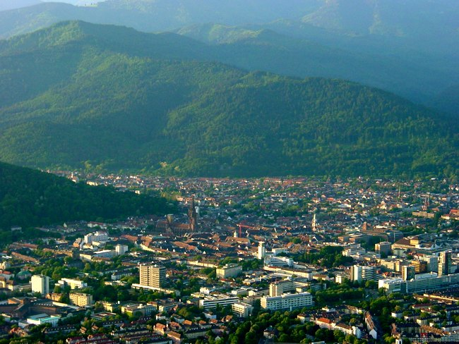 Luftbild von Freiburg aufgenommen bei einer Ballonfahrt über der Messe Freiburg